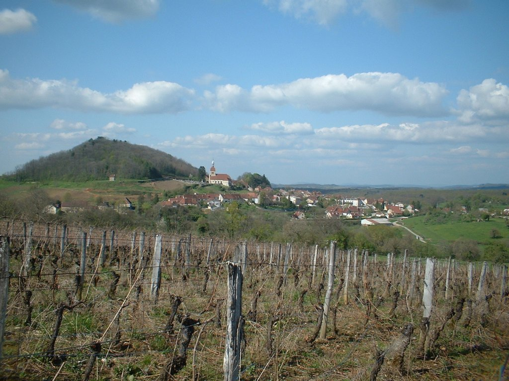 Village de Saint Lothain dans le Jura - France